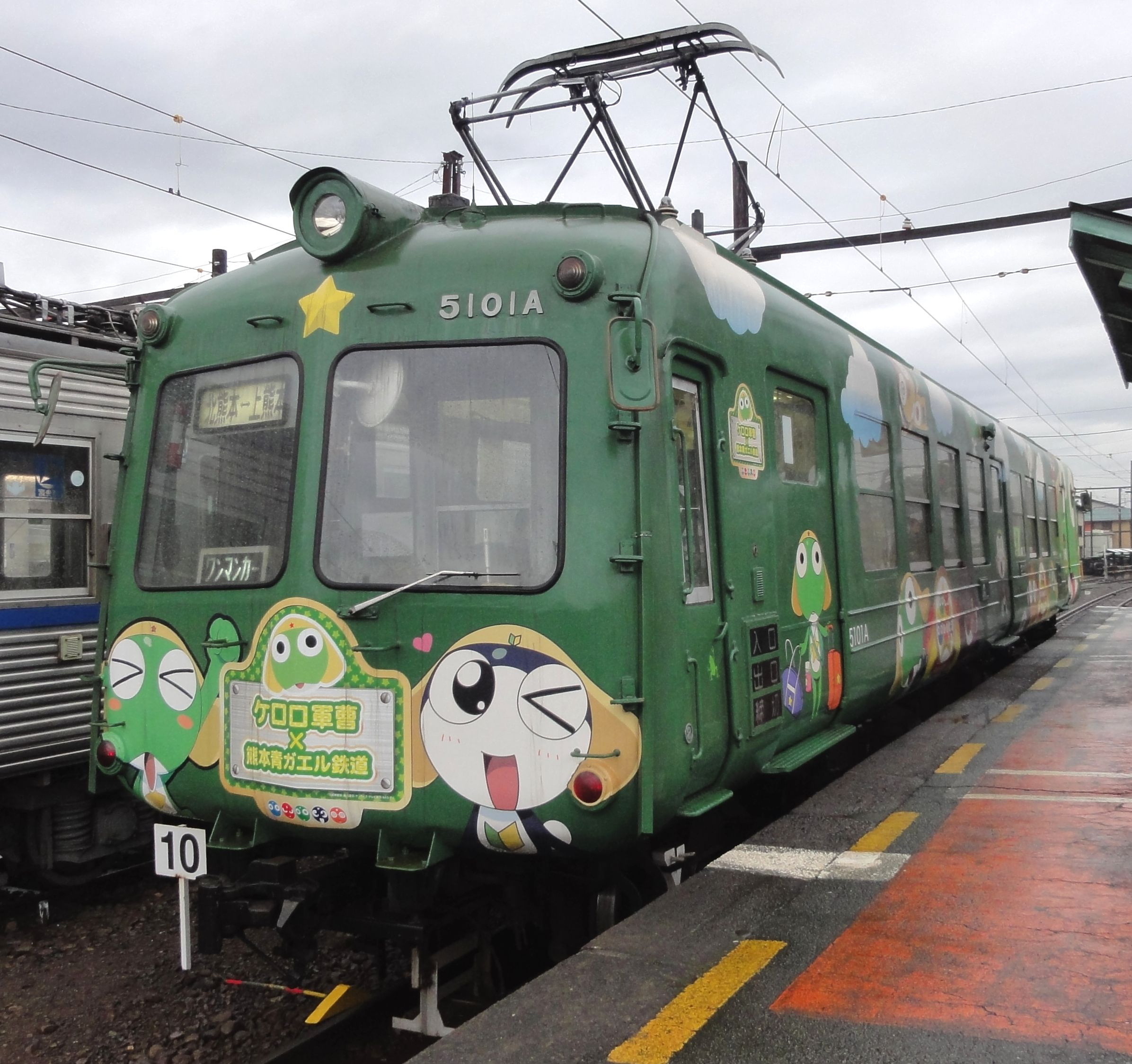 熊本電鉄5000系 ケロロ軍曹のラッピングトレイン 北熊本駅で撮影